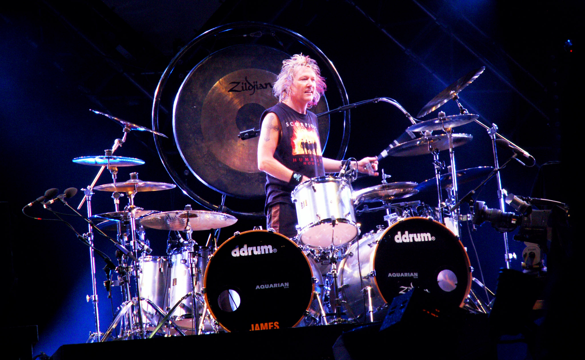 James Kottak au Festival de Bobital en 2008